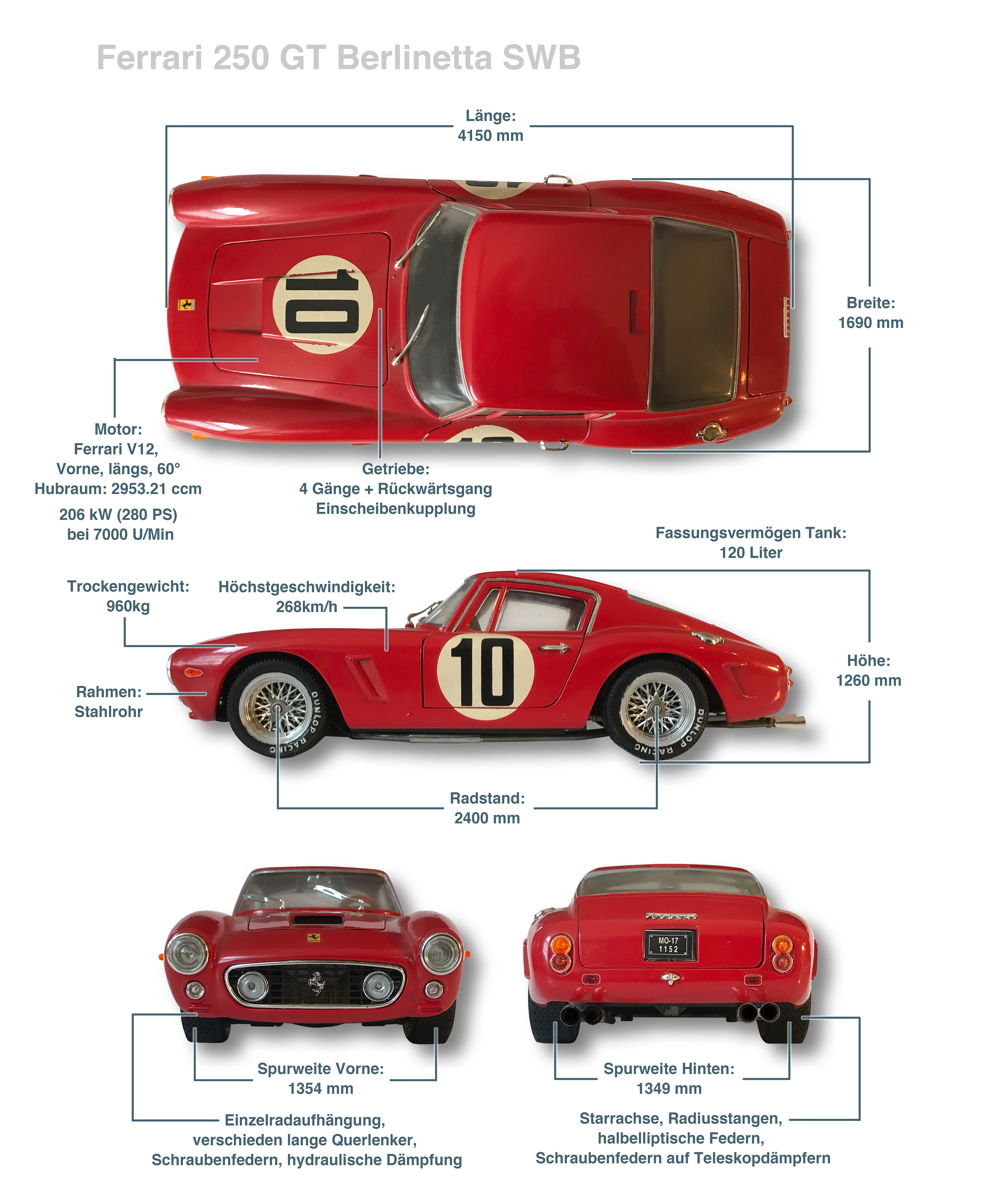 Grafisch aufbereitete Basis-Informationen zum Ferrari 250 GT Berlinetta SWB